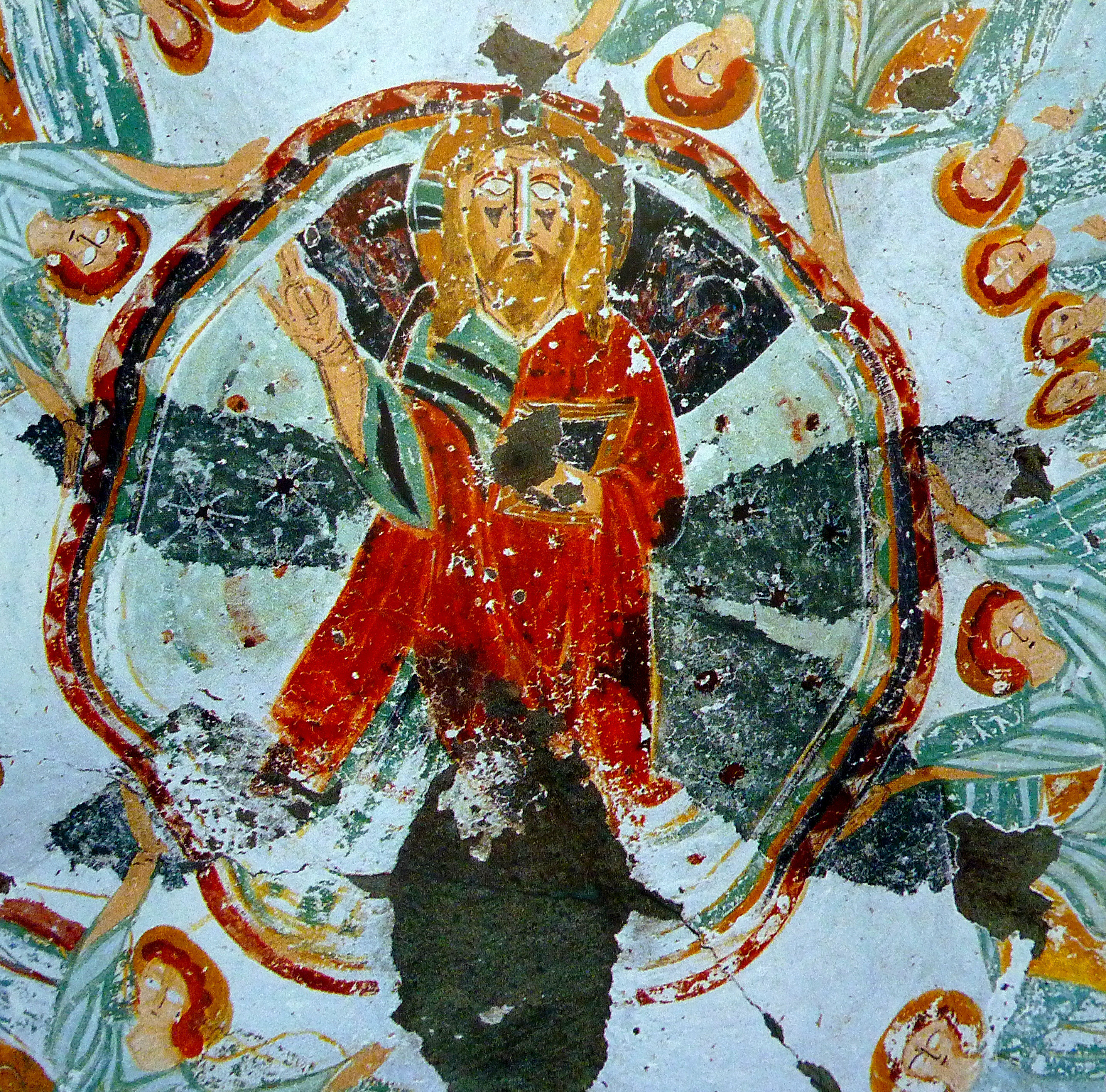 Kappadókia/Göreme Nemzeti Park: Dániel-templom freskója